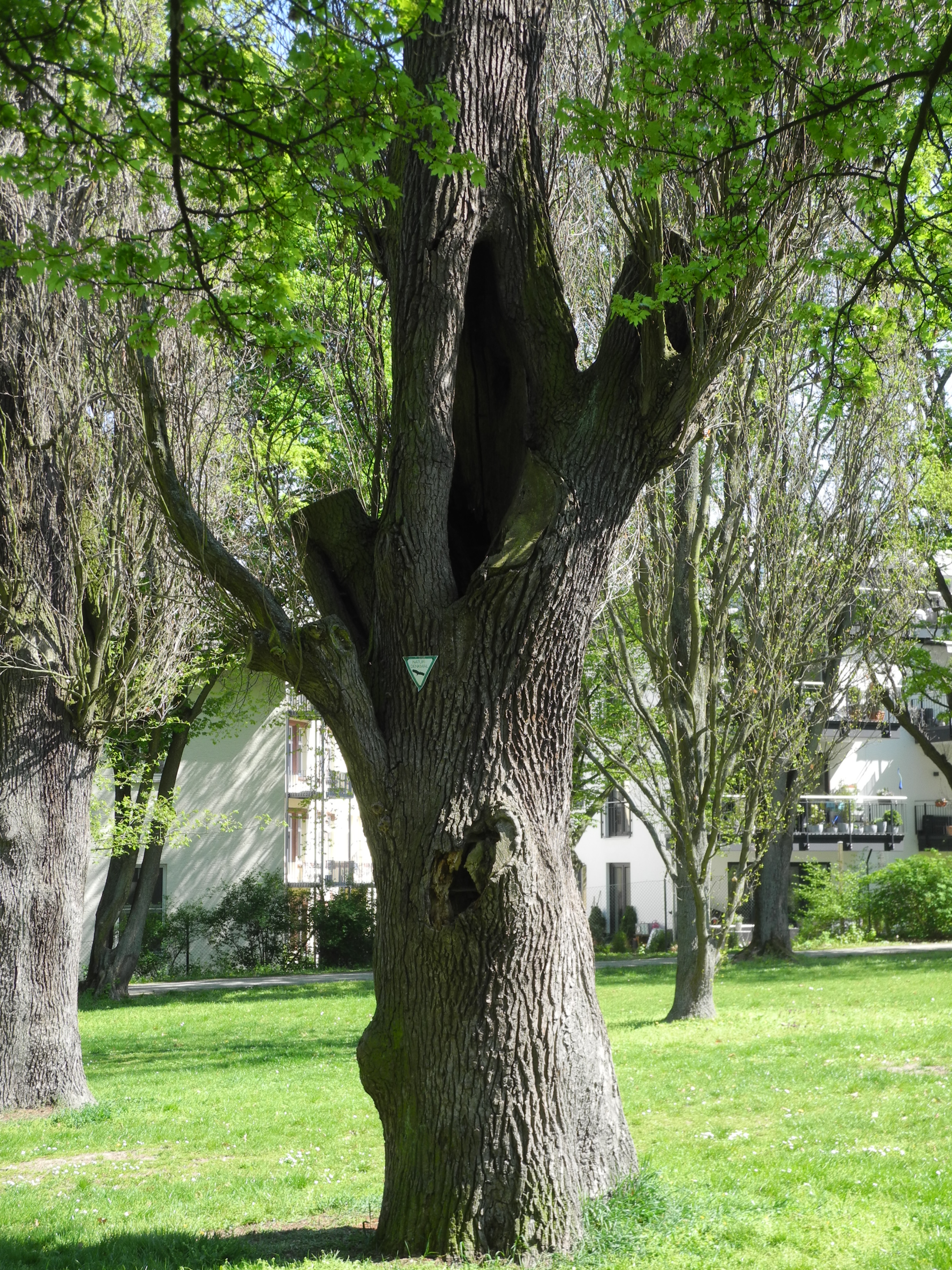 Naturdenkmal in Kassel, auf der Grünfläche nördlich des Schloss Schönfeld.